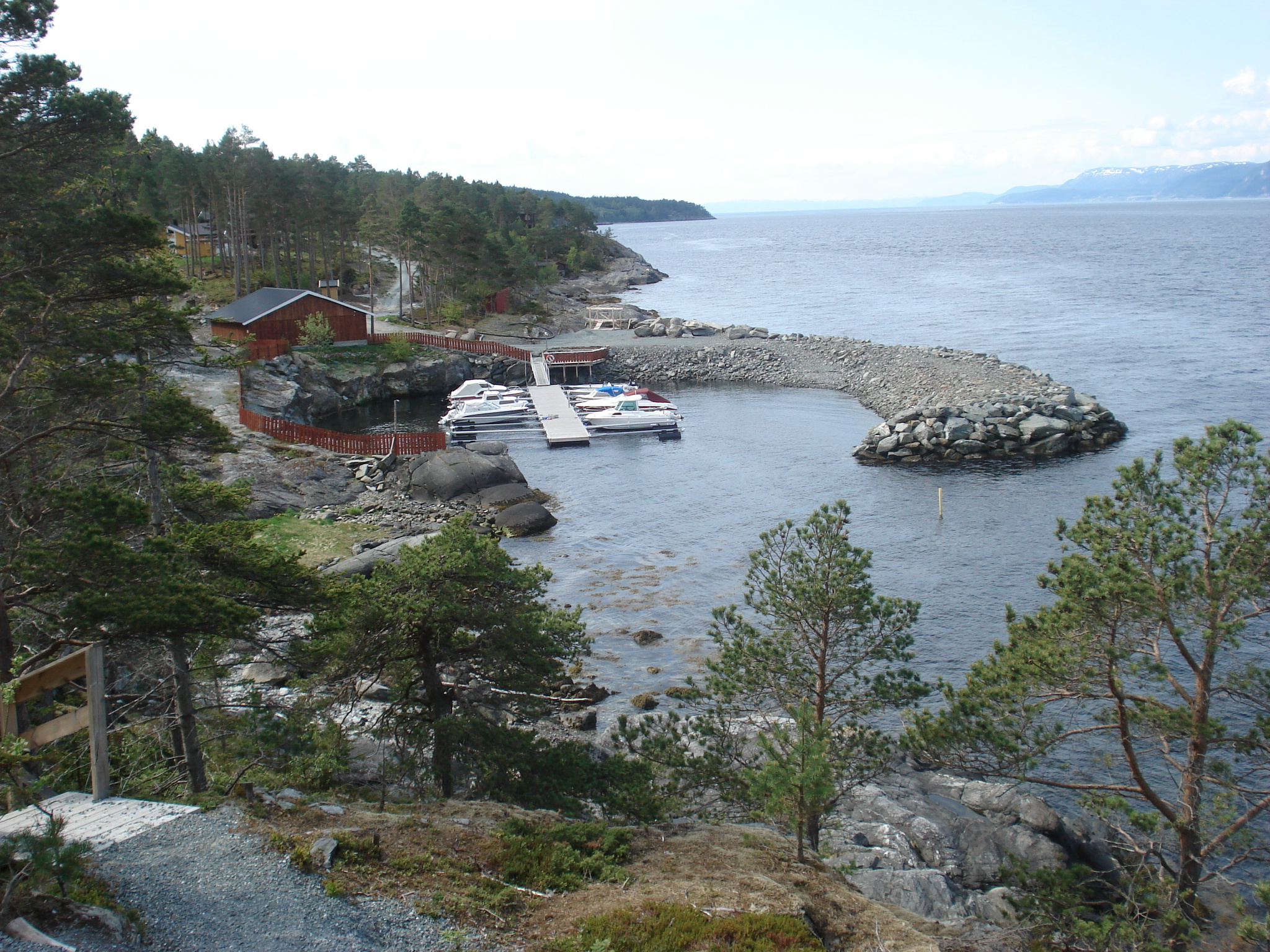 Molo og hamn for fritidsbåter, Viktil på Frosta ved Trondheimsfjorden